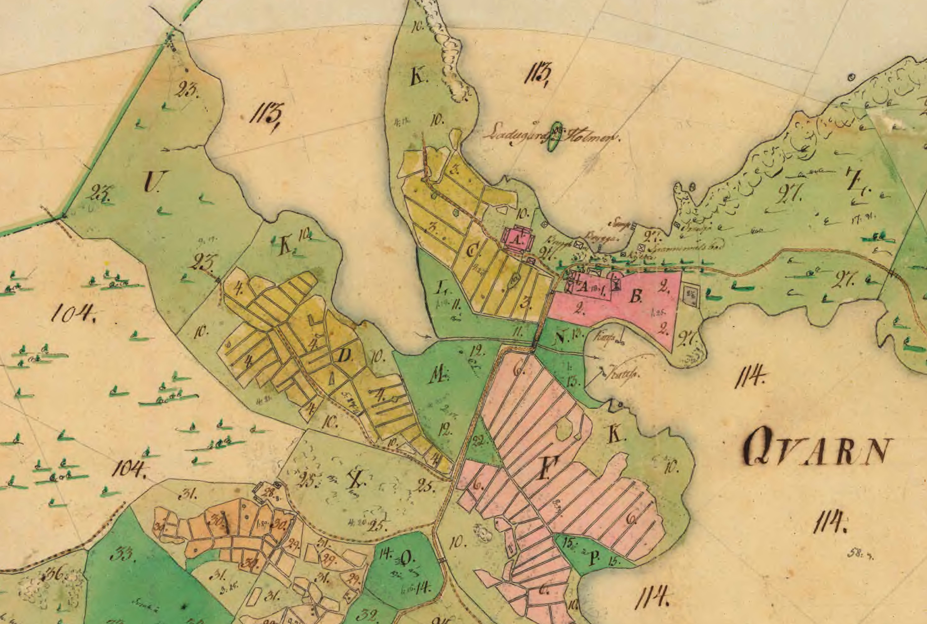 Karta över del av Bjursnäs ägor